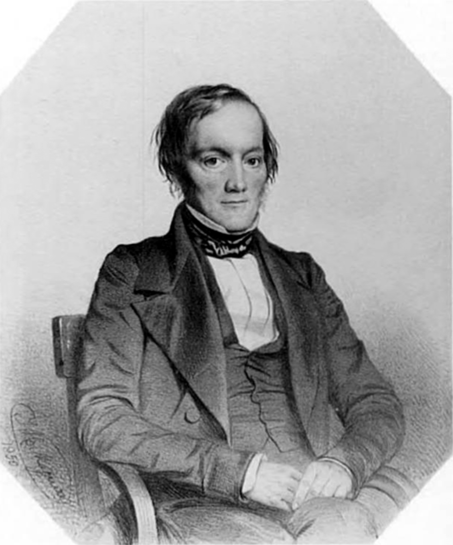 Porträt Richard Owen von Thomas Herbert Maguire (1850)